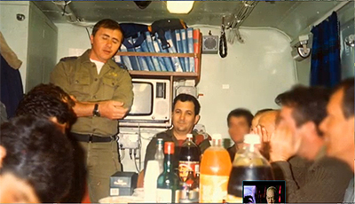 מפקדים בהפלגה לפעולת החיסול בתוניס. עומד אלכס טל יושב אהוד ברק